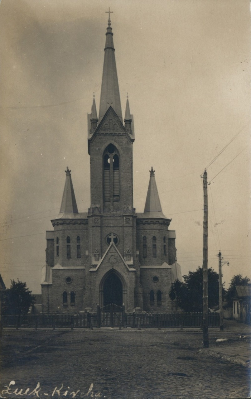 Німецька кірха у Луцьку в 1915 р.